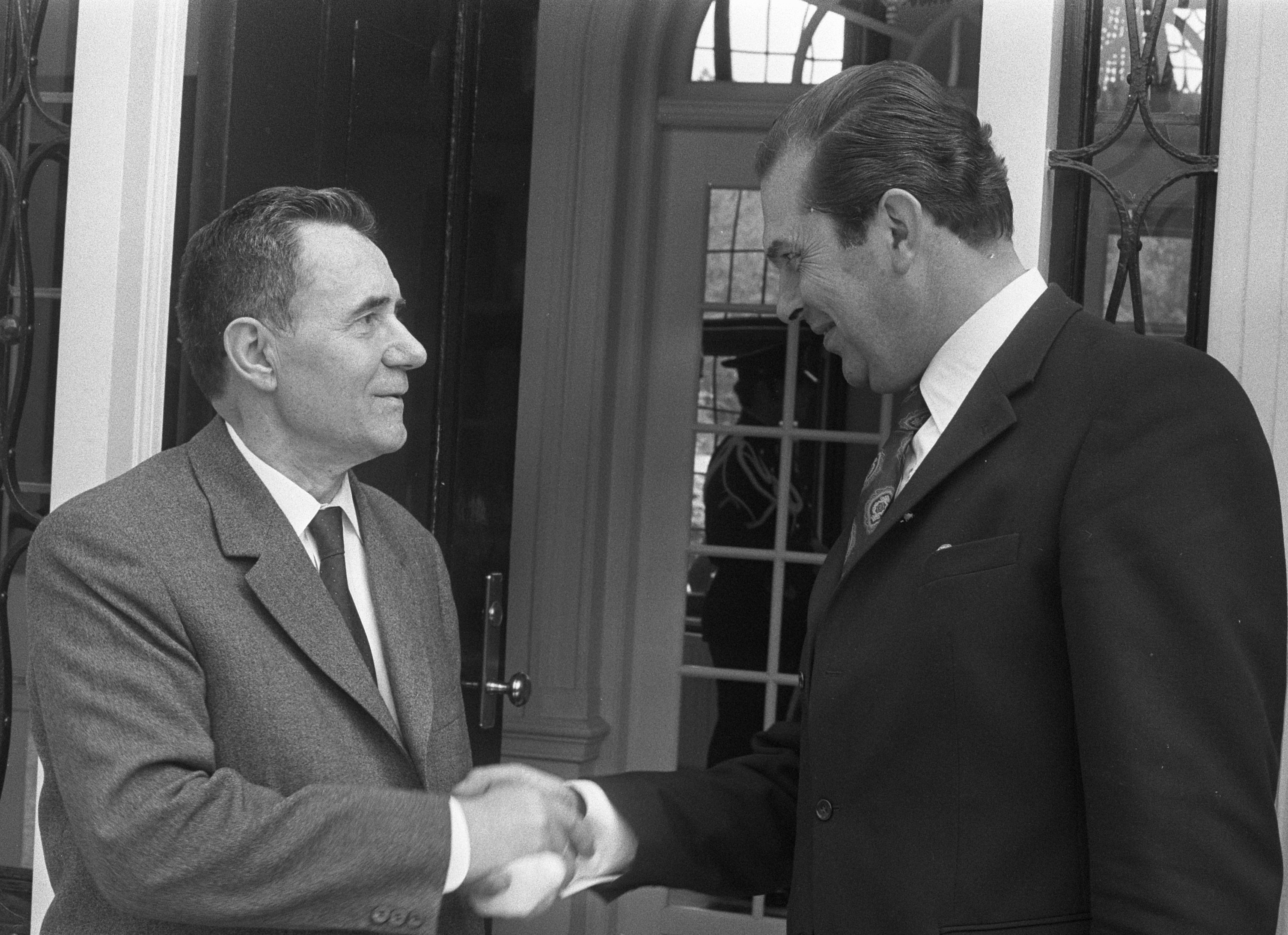 Premier Biesheuvel (rechts) ontvangt Gromyko op het Catshuis, begroeting